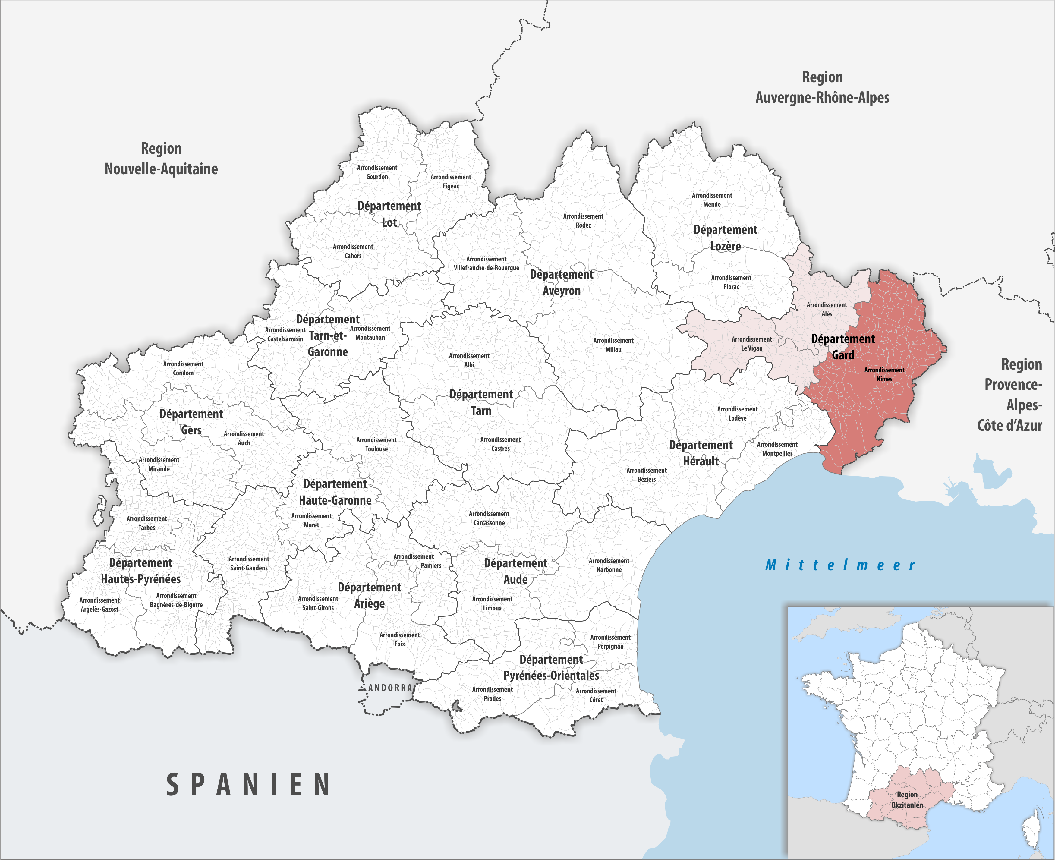 Lage des Arrondissements Nîmes